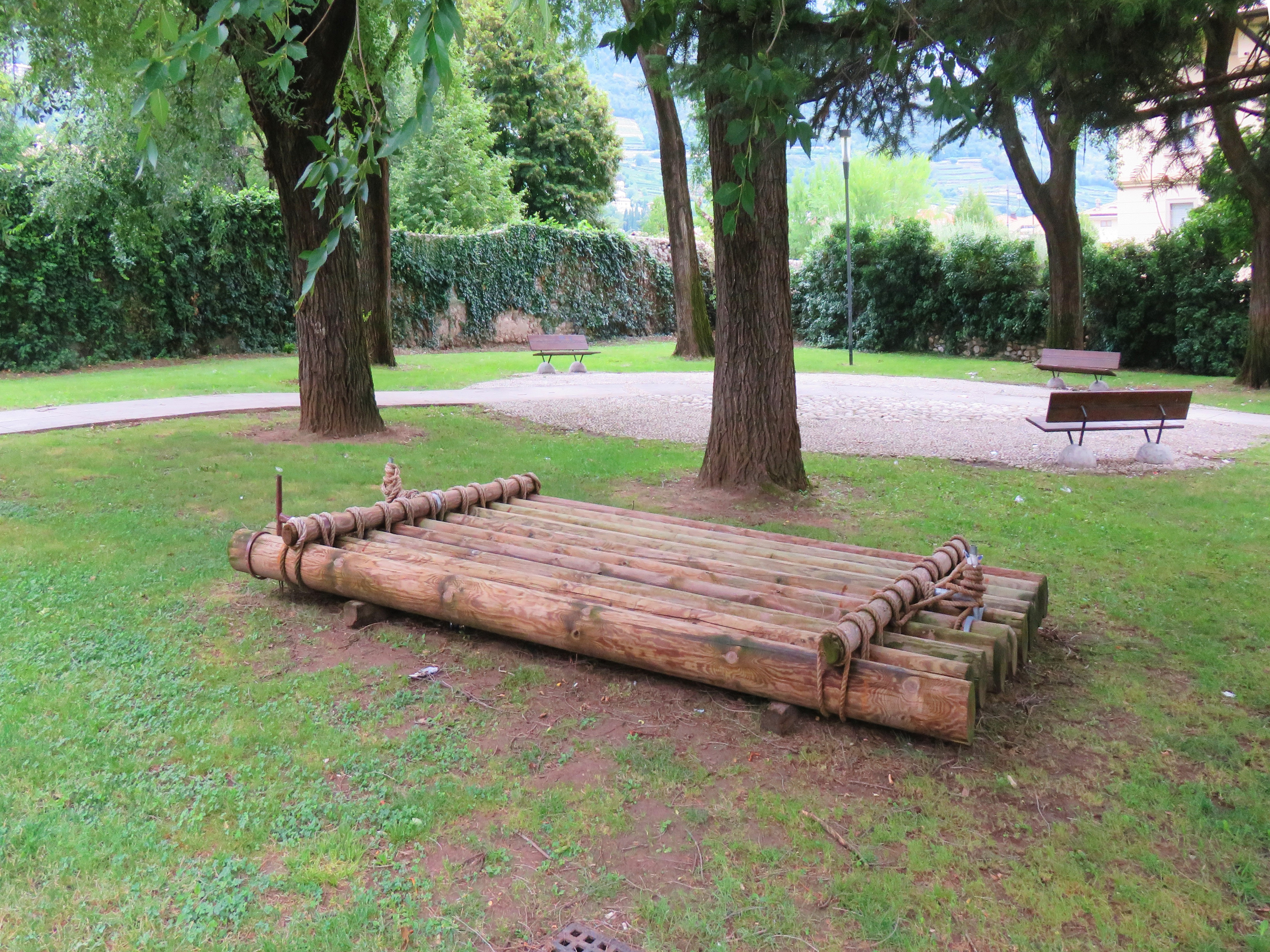 Chiesa di San Giovanni Battista - Esterno - Giardini con zattera